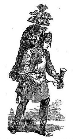 Marchand de coco XVIIIème siècle.